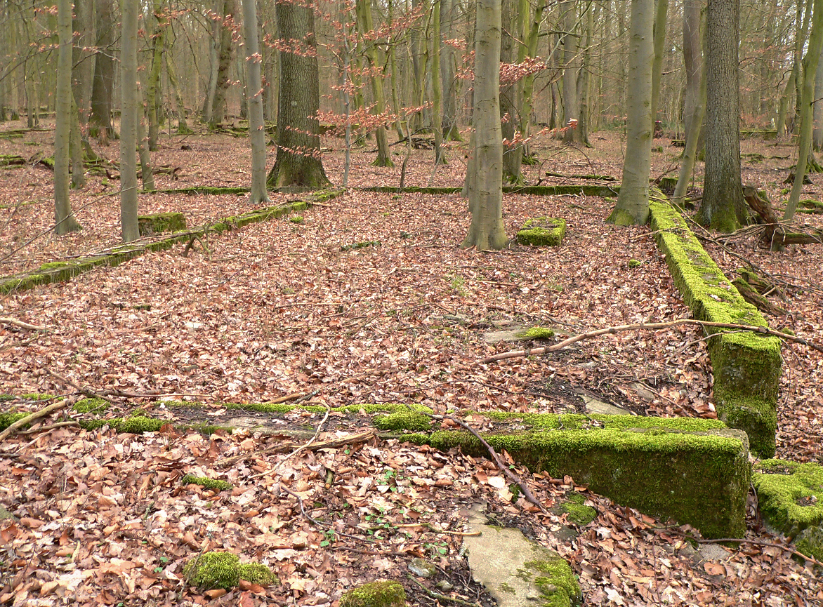 Lenner Lager, Barackenfundament